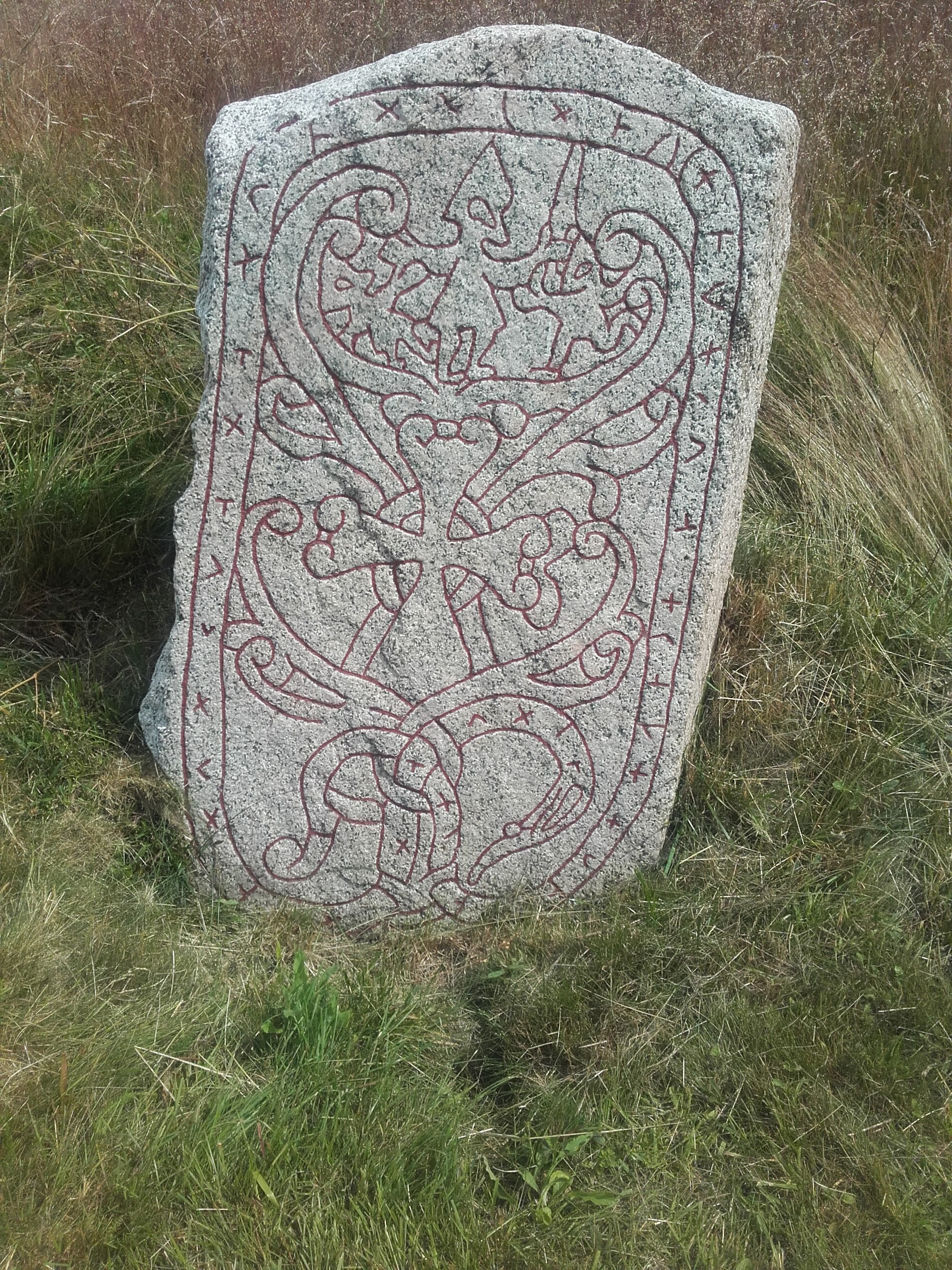 Runsten U 1175 vid Stora Ramsjö, Morgongåva.